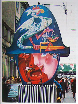 'Uffschloo schtatt abschloo', Laterne vom VKB, 350x230cm